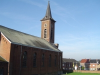 Sint-Martinuskerk te Kester